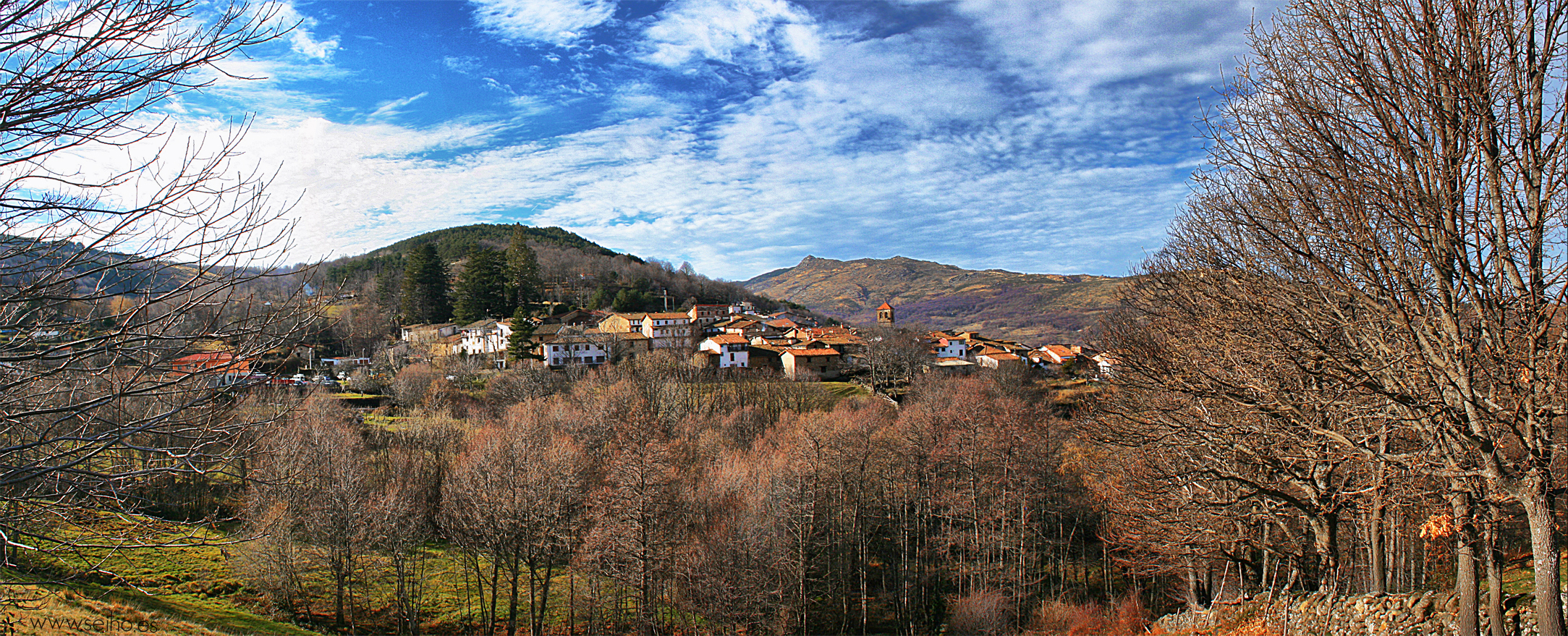 Panorámica de Candelario creative commons